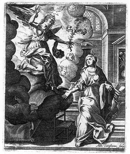 Дабравешчанне. (з кнігі Rosarium...), 1672-1677 гг.